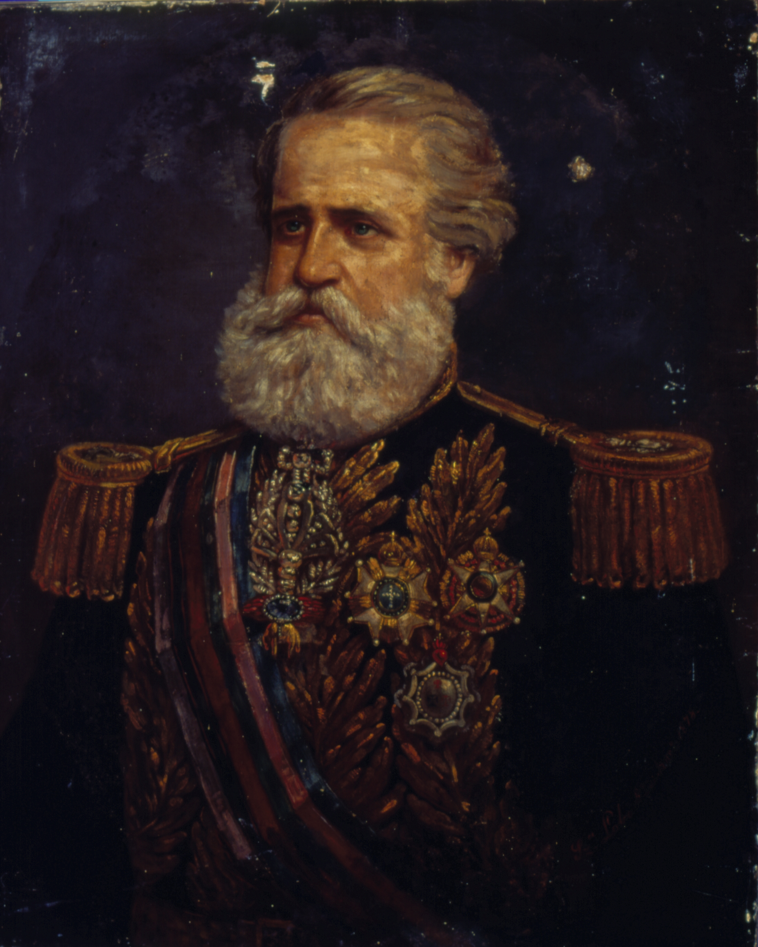 Obra que integra o acervo do Museu Paulista da USP.